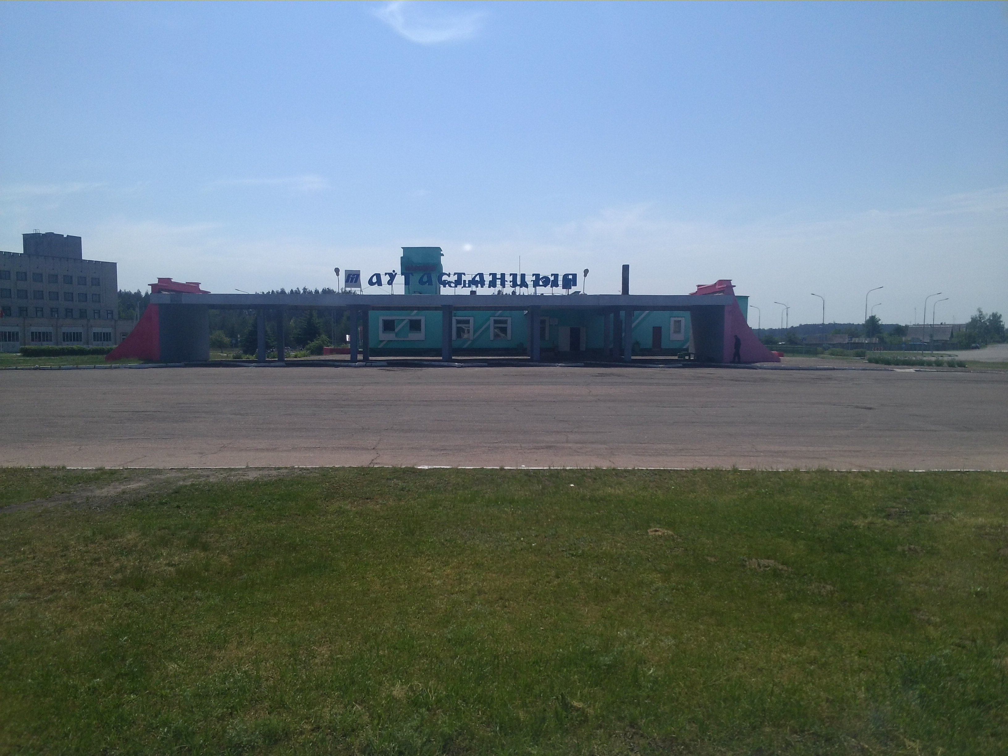 м. Наровля